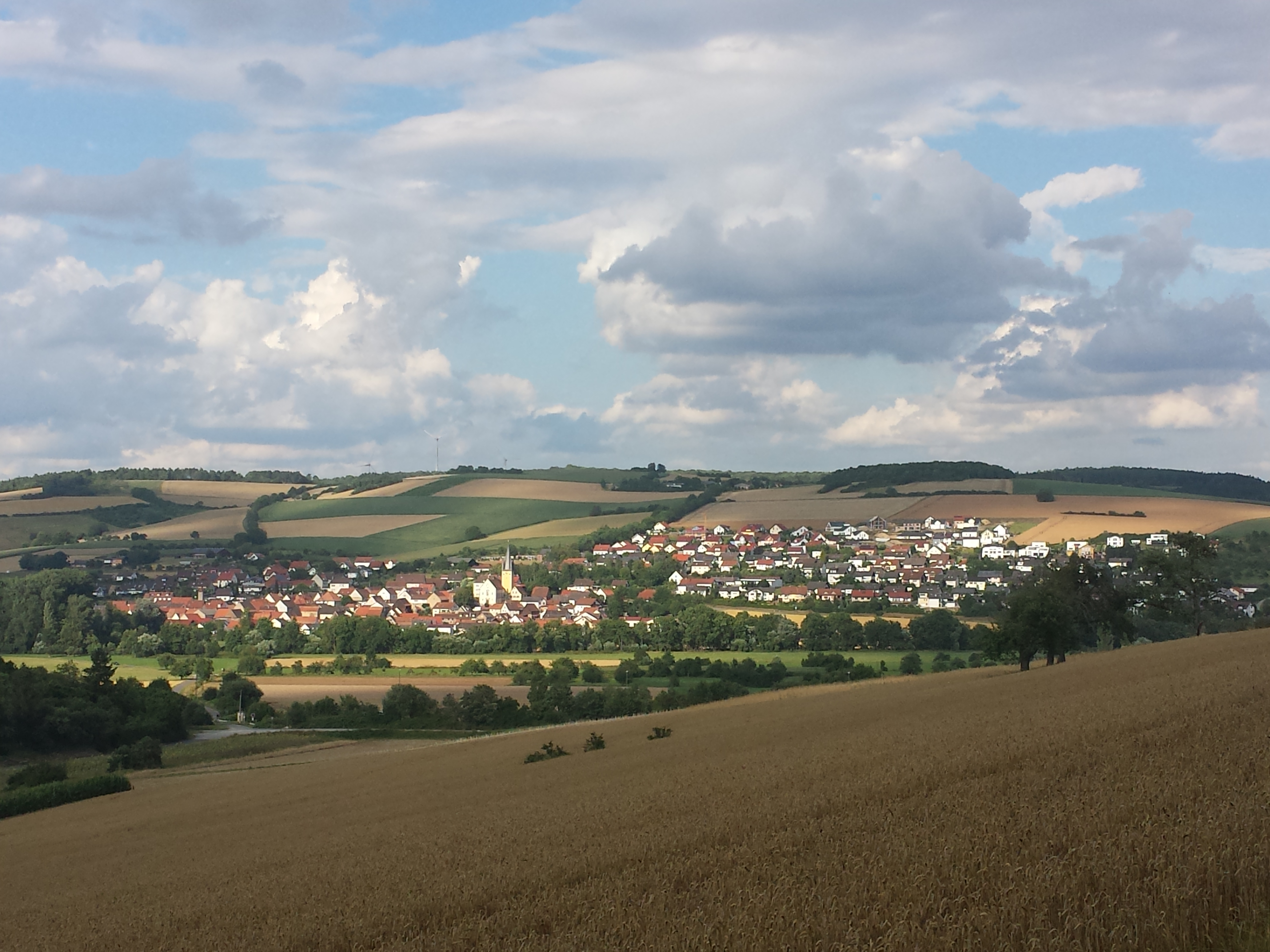 Impfingen, ein Stadtteil von Tauberbischofsheim, der Kreisstadt des Main-Tauber-Kreises.